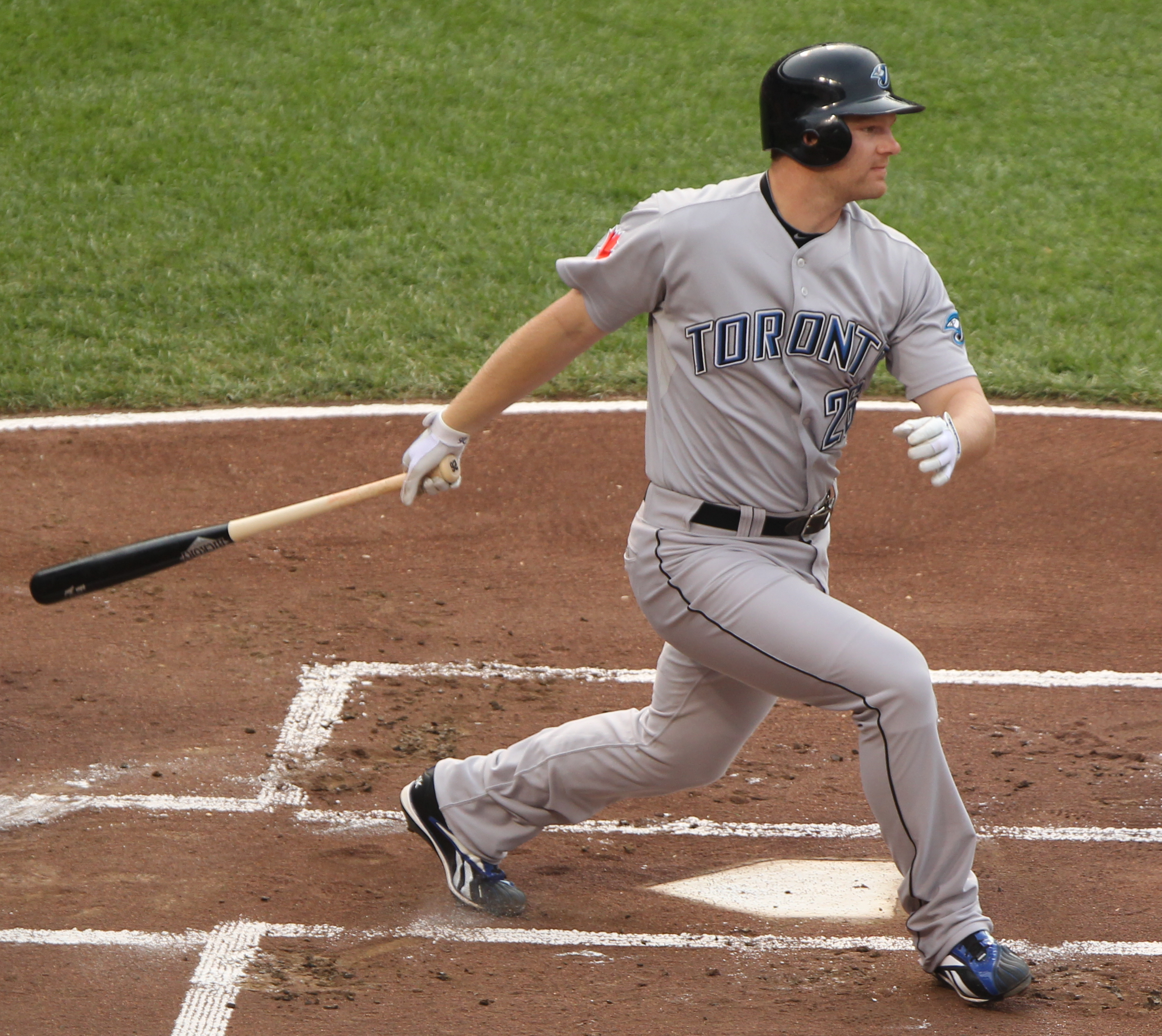 Adam Lind